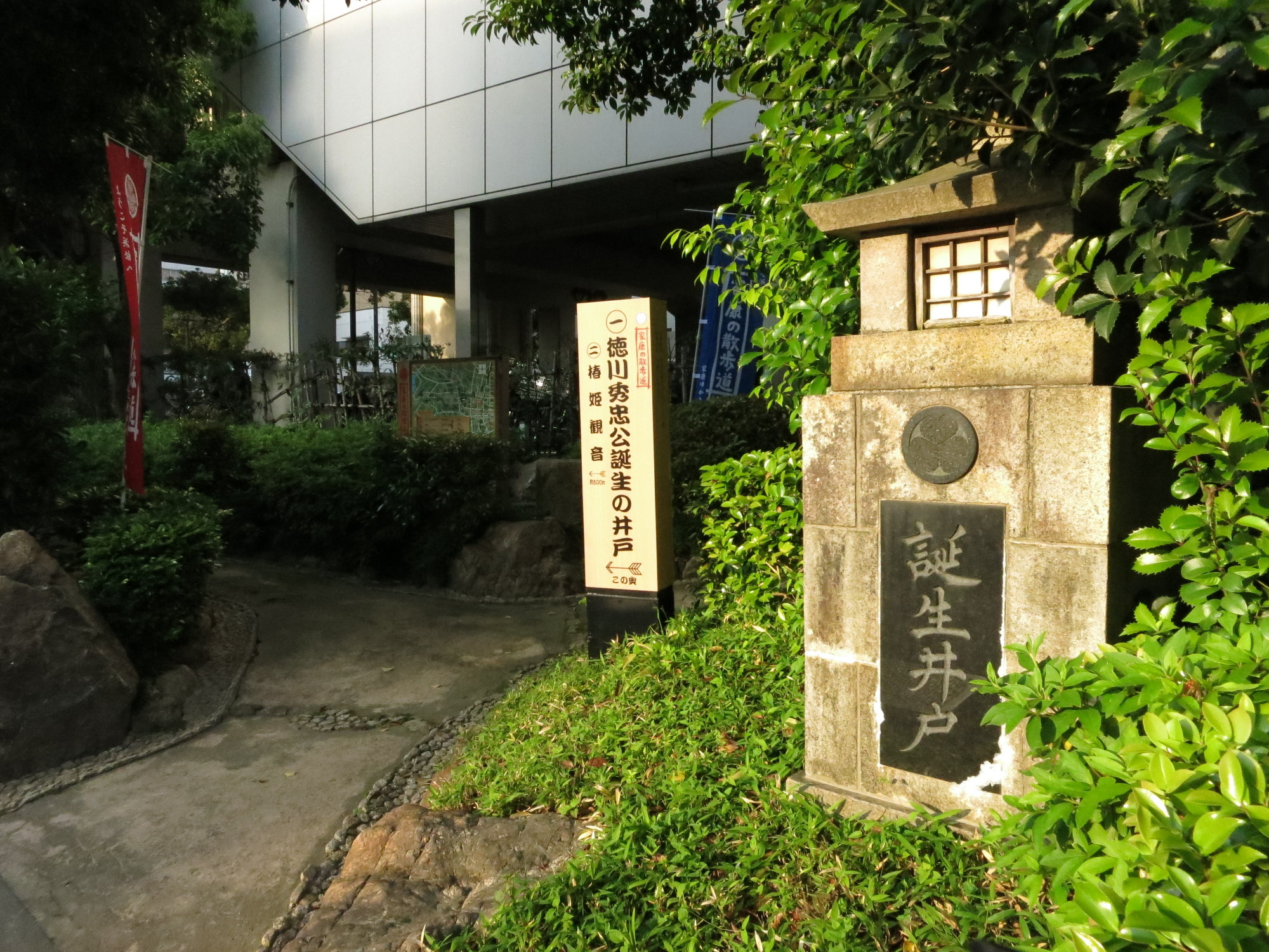 徳川秀忠が産湯を使ったと伝わる井戸。浜松市中区